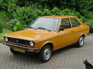 VW Derby